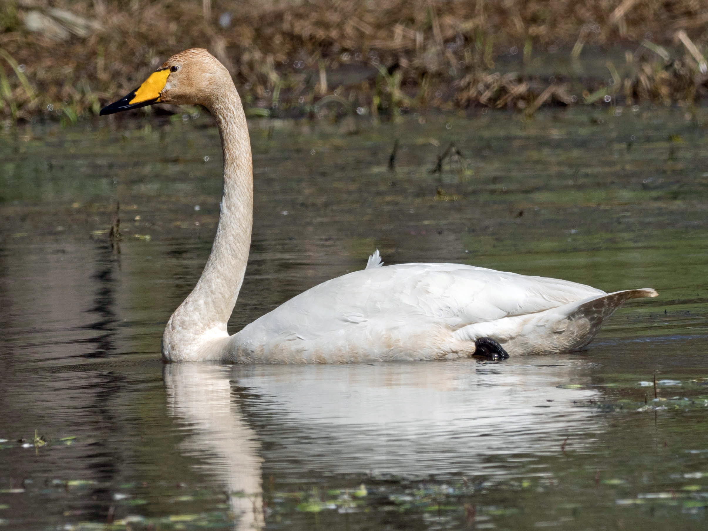 Cygnus cygnus In Sweden